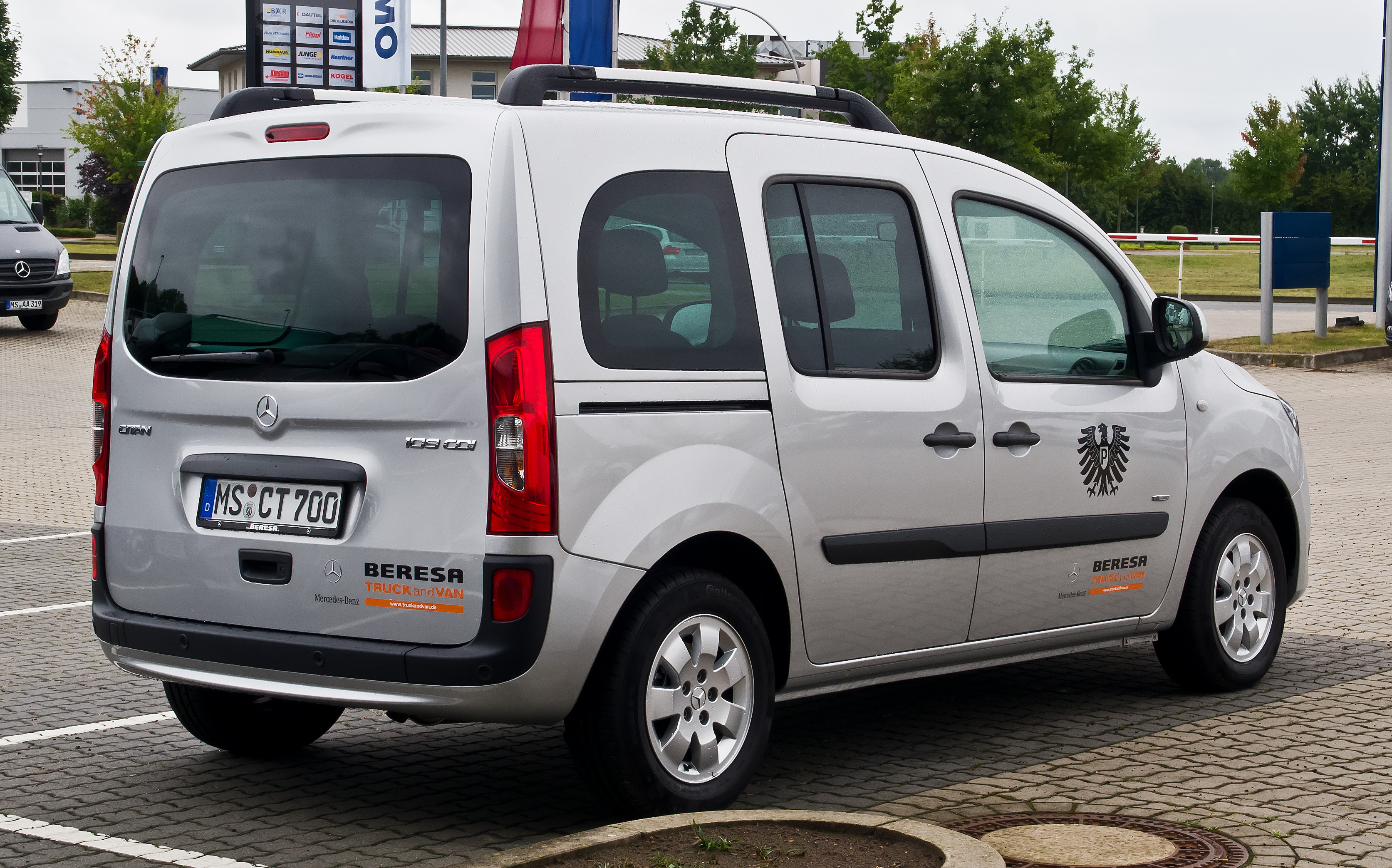 Mercedes-Benz Citan Kombi 109 CDI BlueEFFICIENCY (W 415)